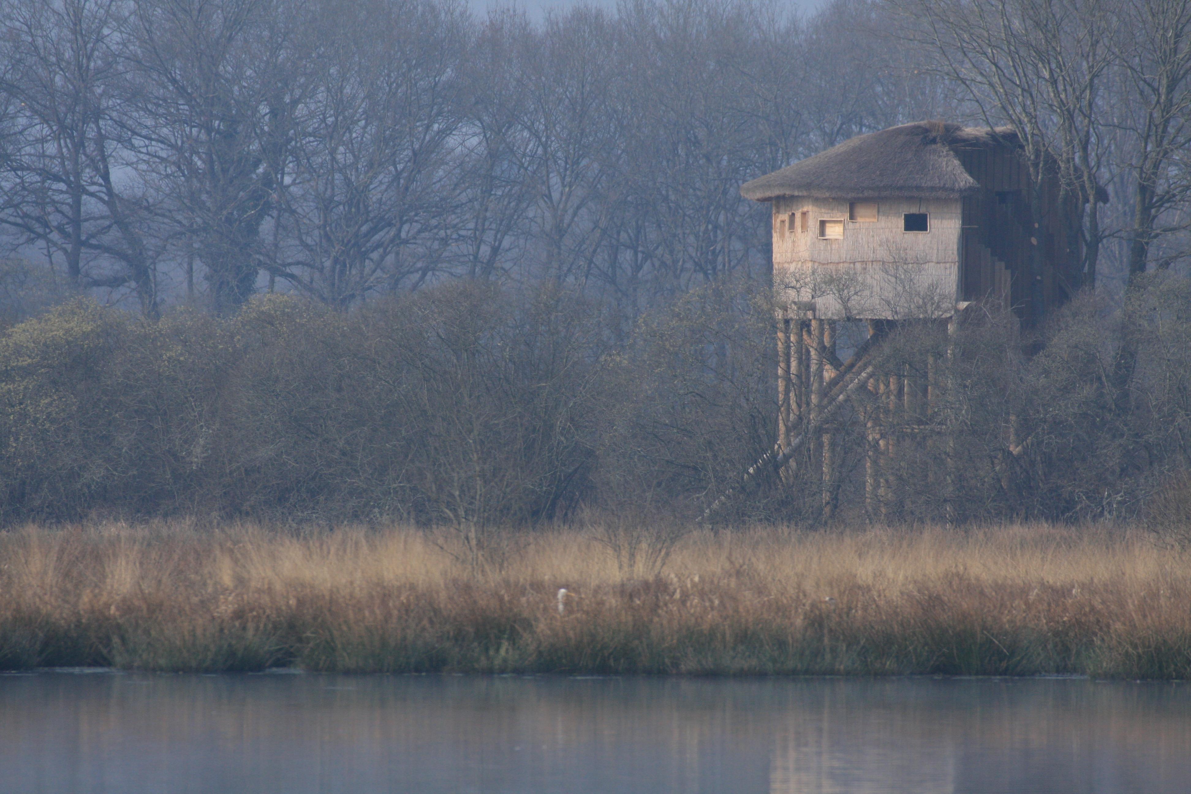 Photographie d'un observatoire ornithologique de l'étang des landes.